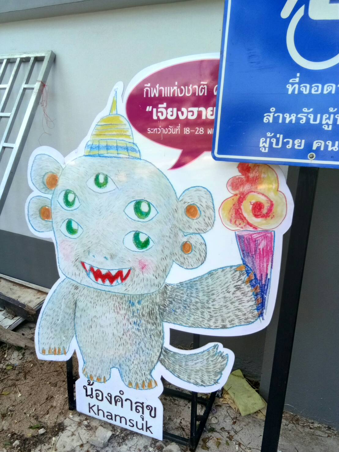 มาสคอตกีฬาแห่งชาติครั้งที่ 46 โดยมีต้นแบบมาจากแมงสี่หูห้าตา เป็นสัตว์ในตำนานของจังหวัดเชียงราย ออกแบบโดย พจวรรณ พันธ์จินดา